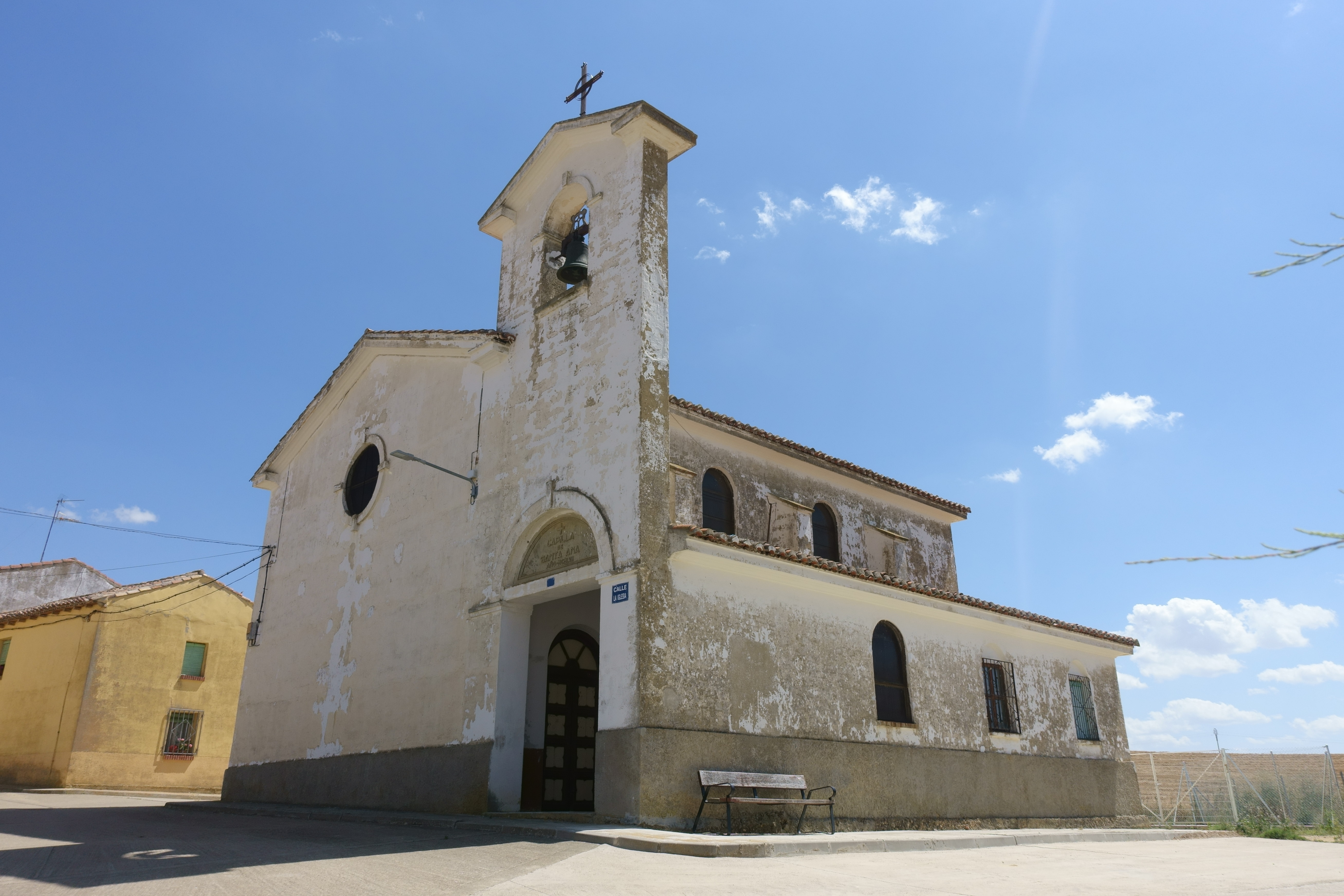 Capilla de Santa Ana, en Lomas (Palencia, España).